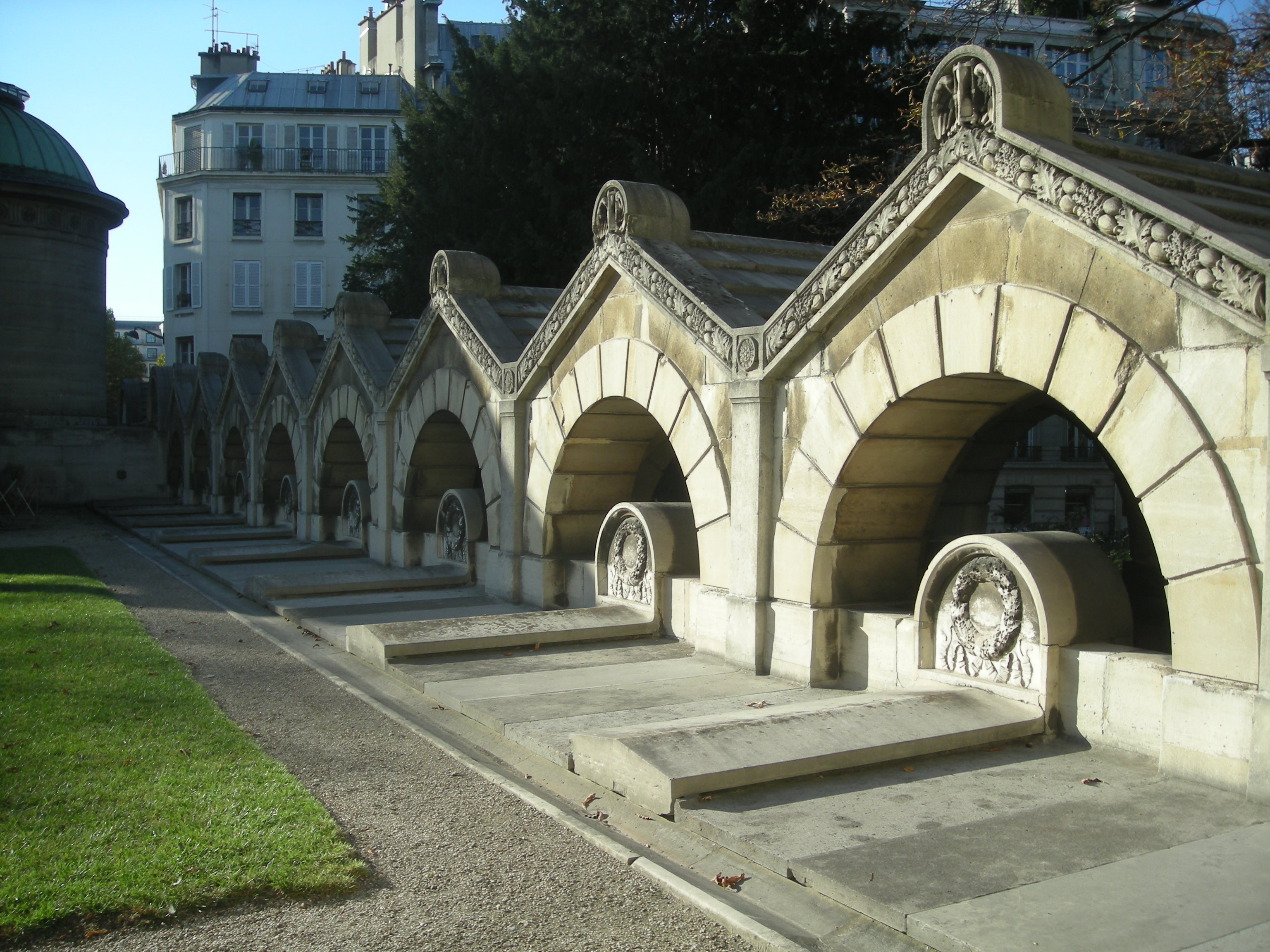 Chapelle expiatoire, Paris, France.